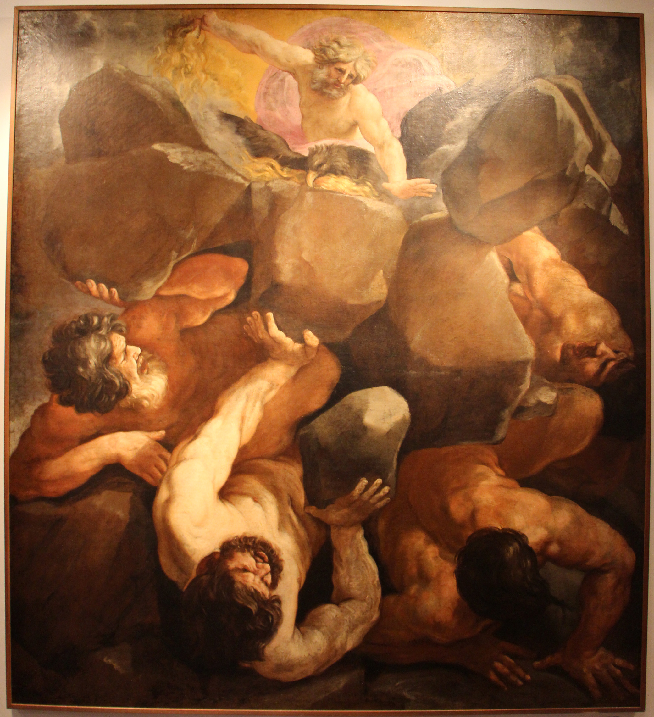 Museo Civico This is a photo of a monument which is part of cultural heritage of Italy.